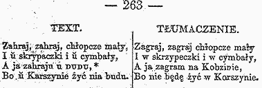 Беларуская (тарашкевіца): Урывак зь вершу Паўлюка Багрыма «Зайграй, зайграй, хлопча малы…», выдадзенага ў кнігарні Аляксандра Рыпінскага